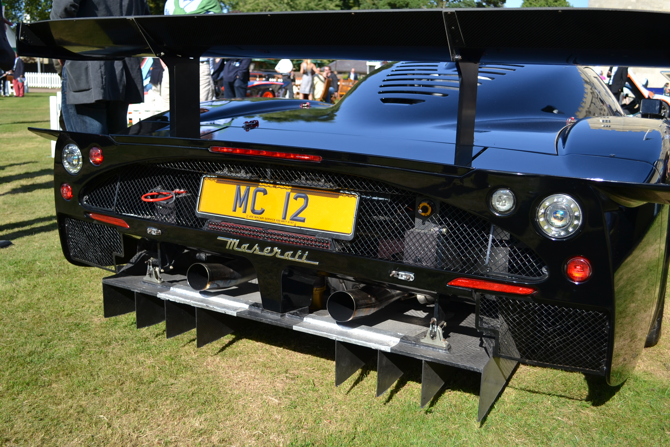 Salon Privé London 2012